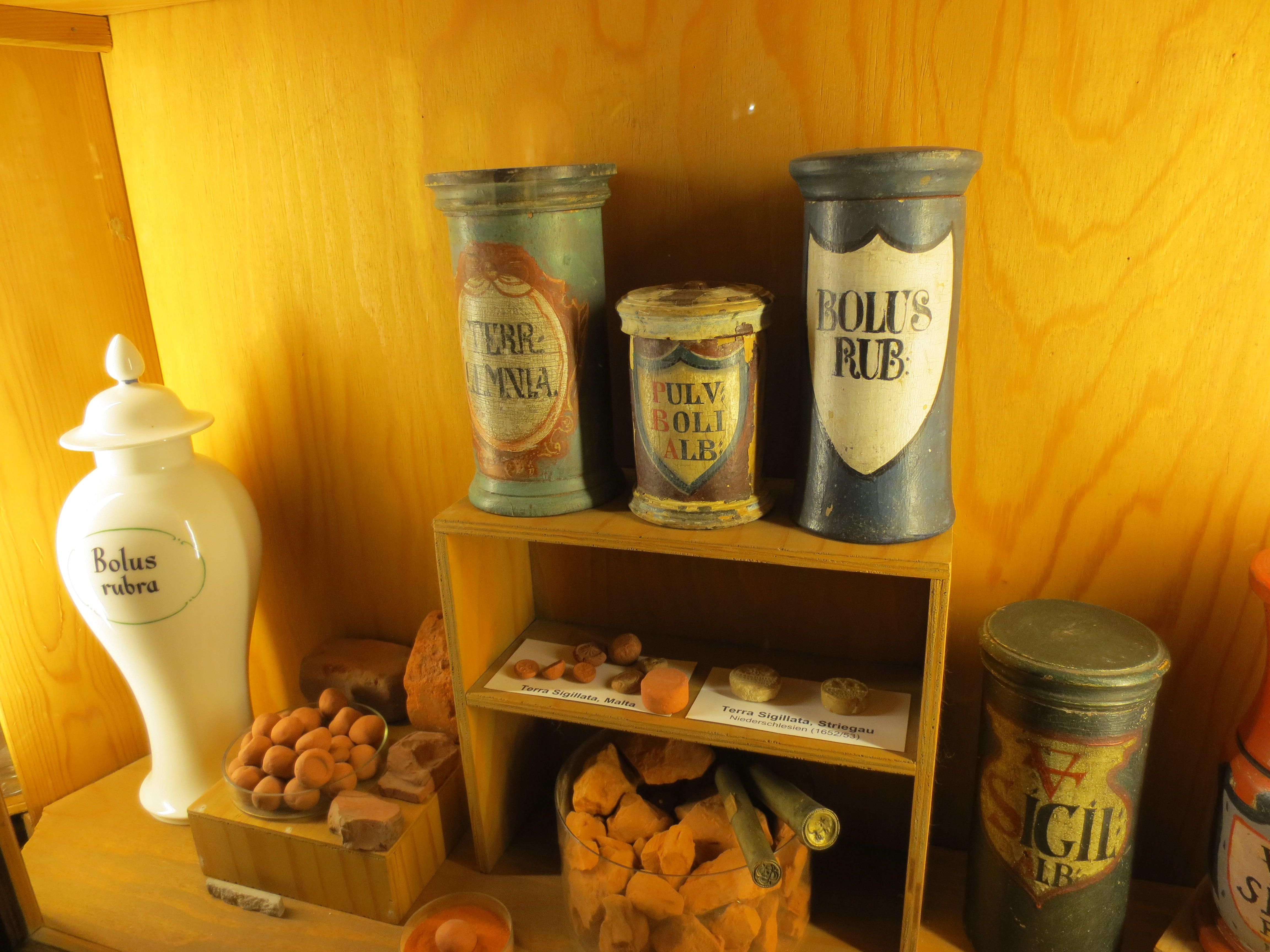 Vitrine mit Bolus Armenicus und anderen Tonerden Deutsches Apothekenmuseum